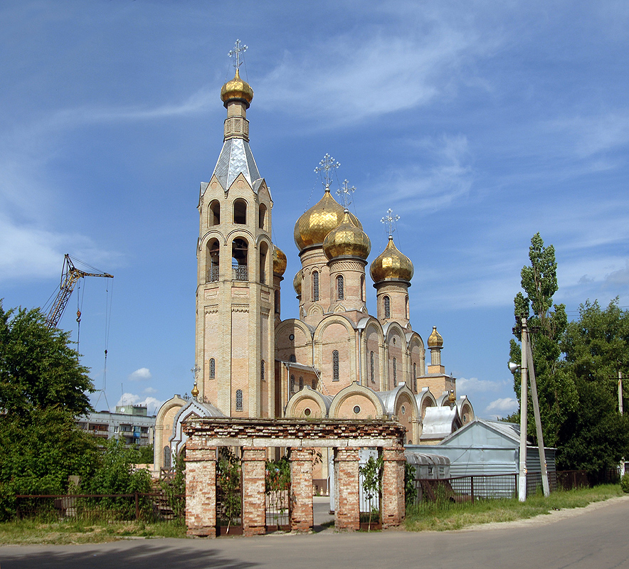 Курахово. Храм иконы Божьей Матери «Державной»